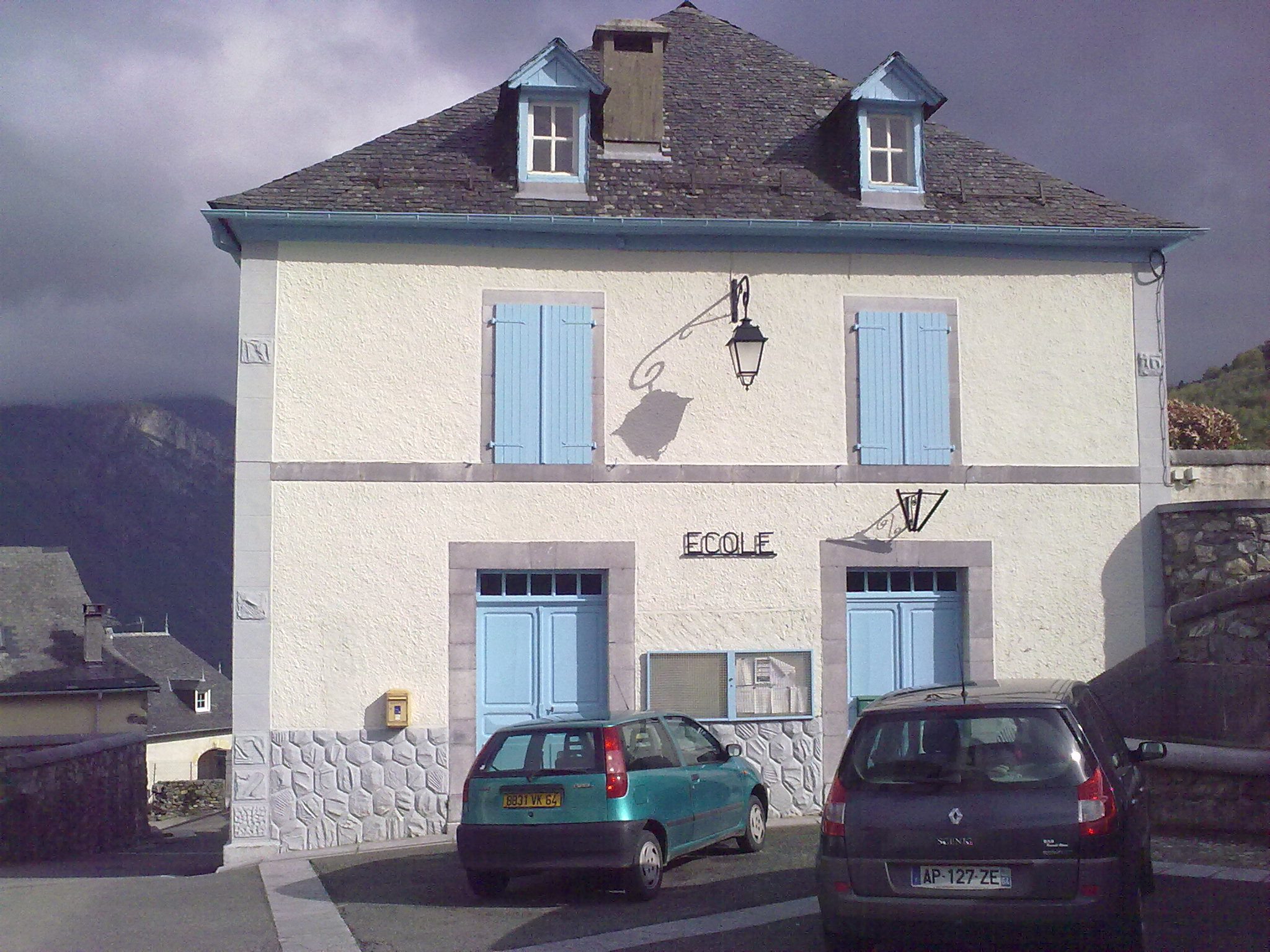 Bilhères, France